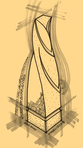 Dibujo de la estatuilla otorgada al ganador del Premio Nacional de Arquitectura